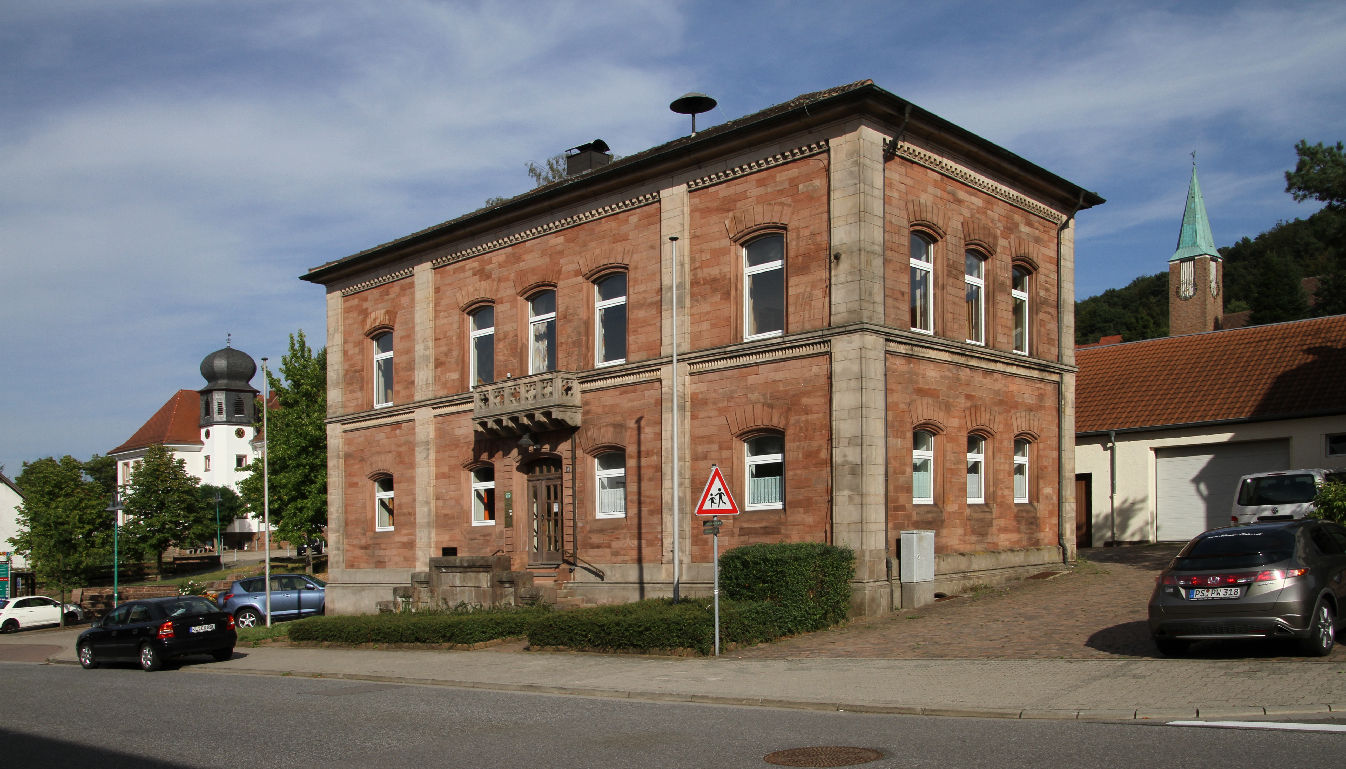 Schopp, Hauptstraße 13; ehemaliges Rat- und Schulhaus; spätklassizistischer Walmdachbau, Mitte des 19. Jahrhunderts.